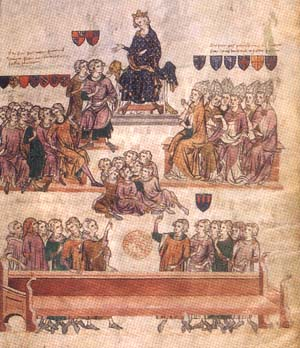 soud Roberta z Artois